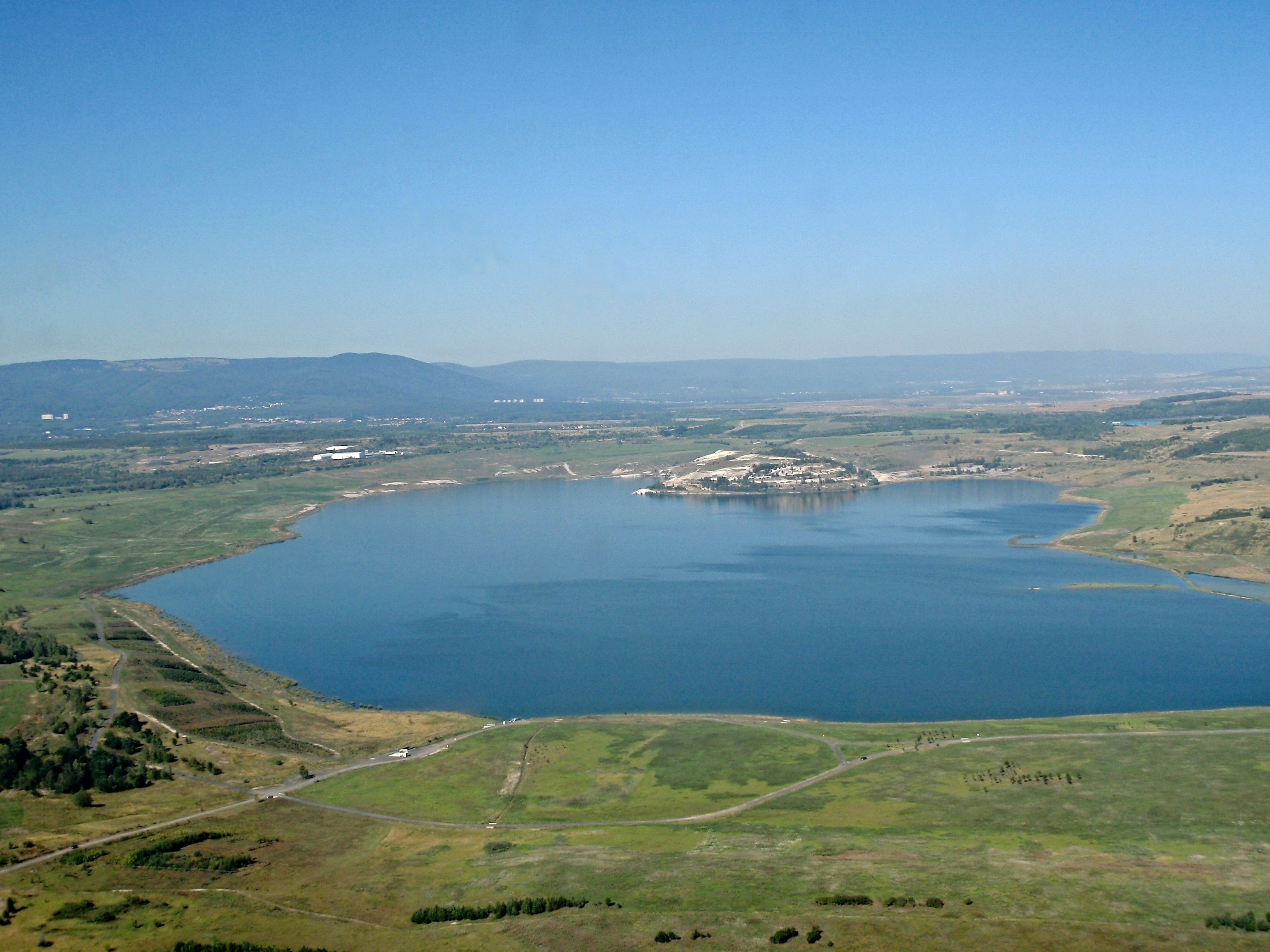 Mostecké jezero z rozhledny na hradě Hněvín